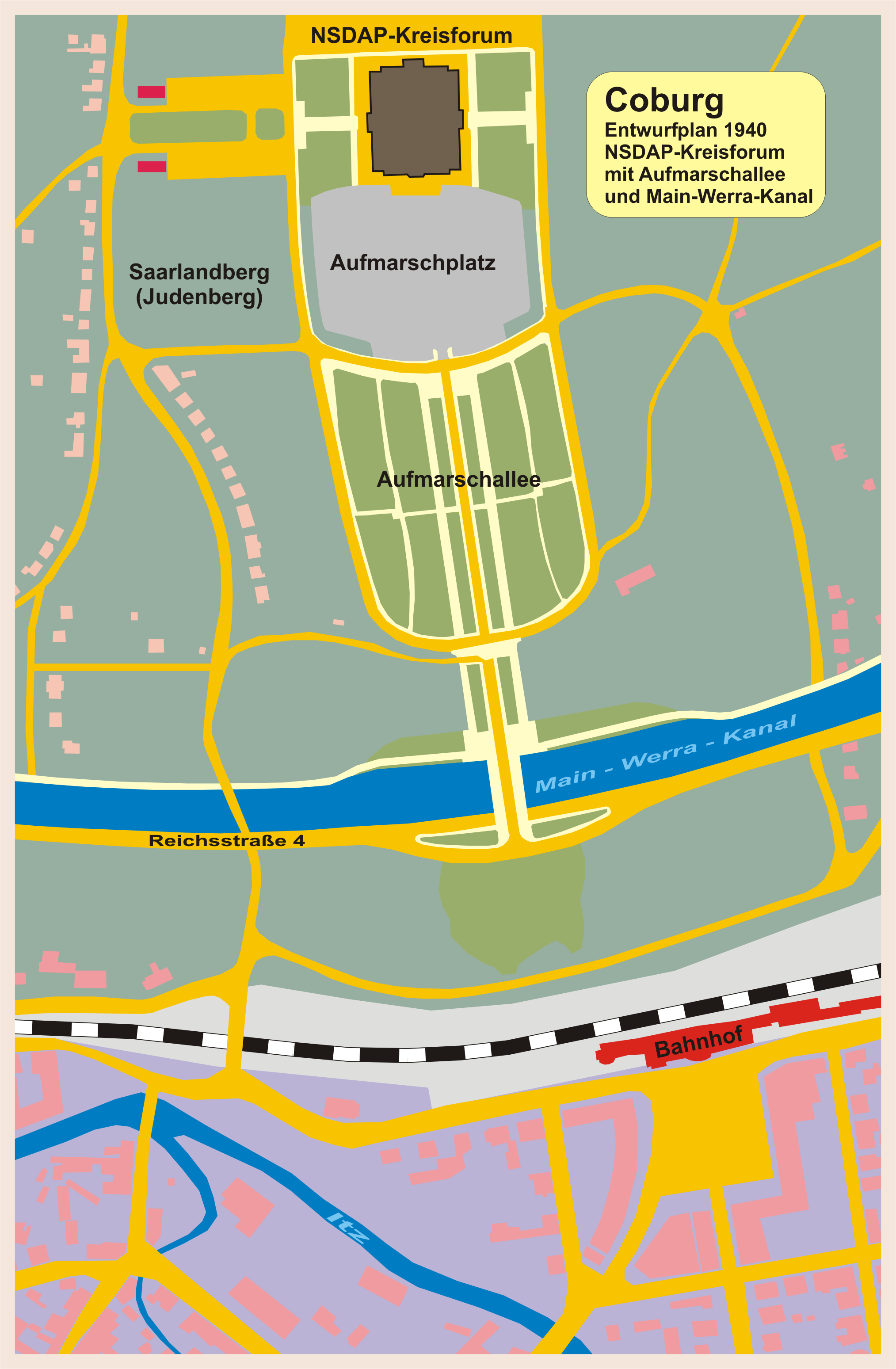 Coburg - Plan des NSDAP-Kreisforums mit Main-Werra-Kanal 1940 - beides wurde nie gebaut